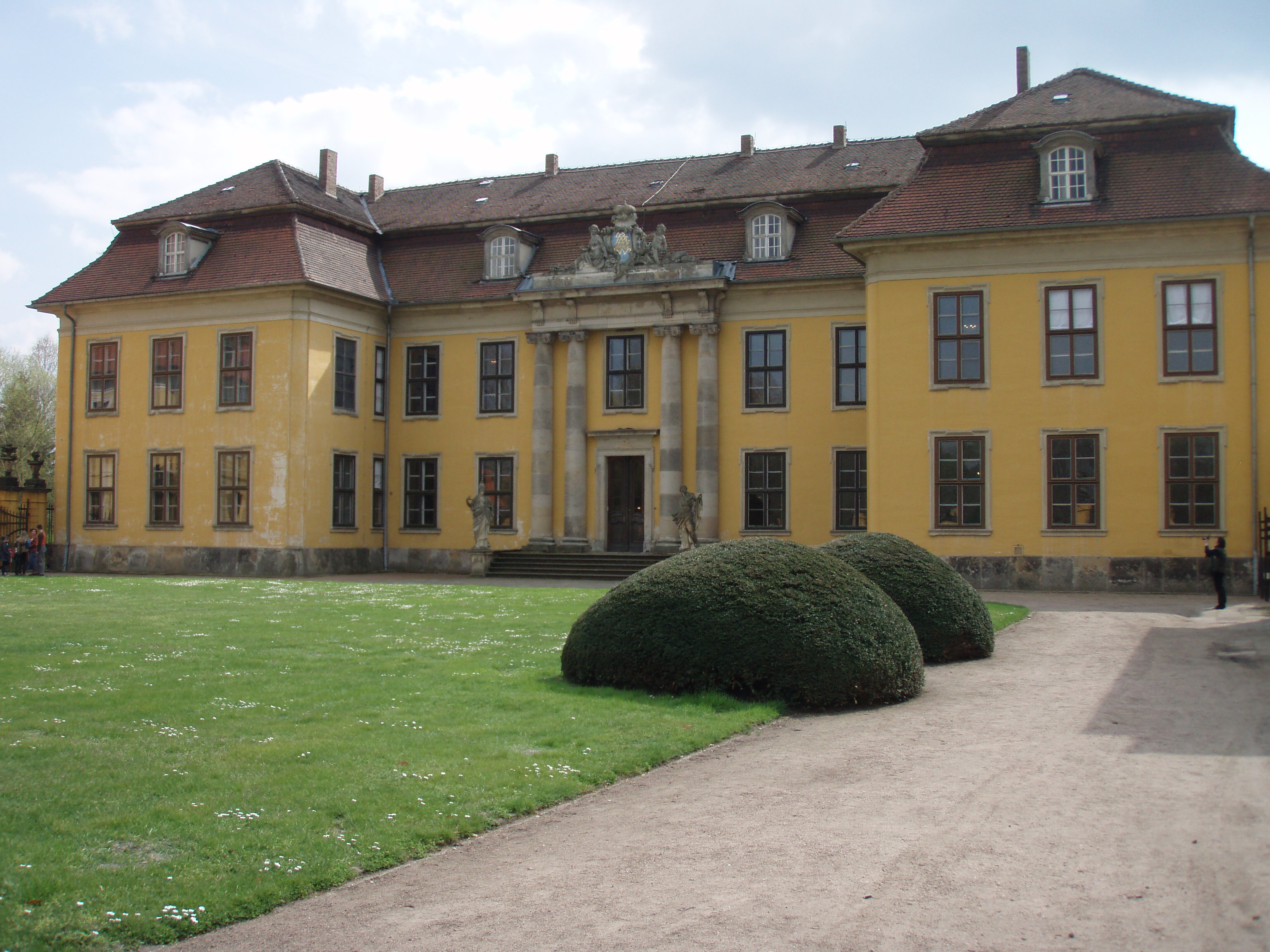 Schloss Mosigkau